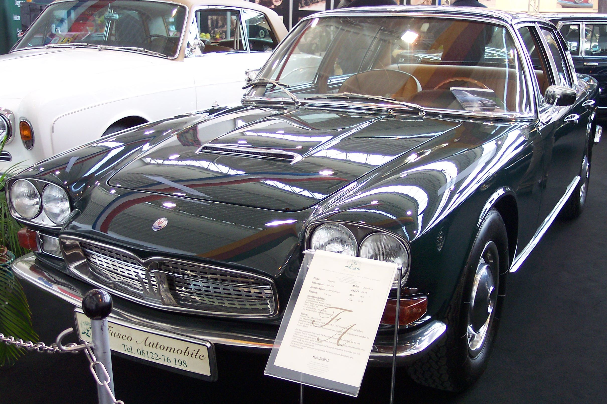 Maserati Quattroporte Serie I/B 7/1968